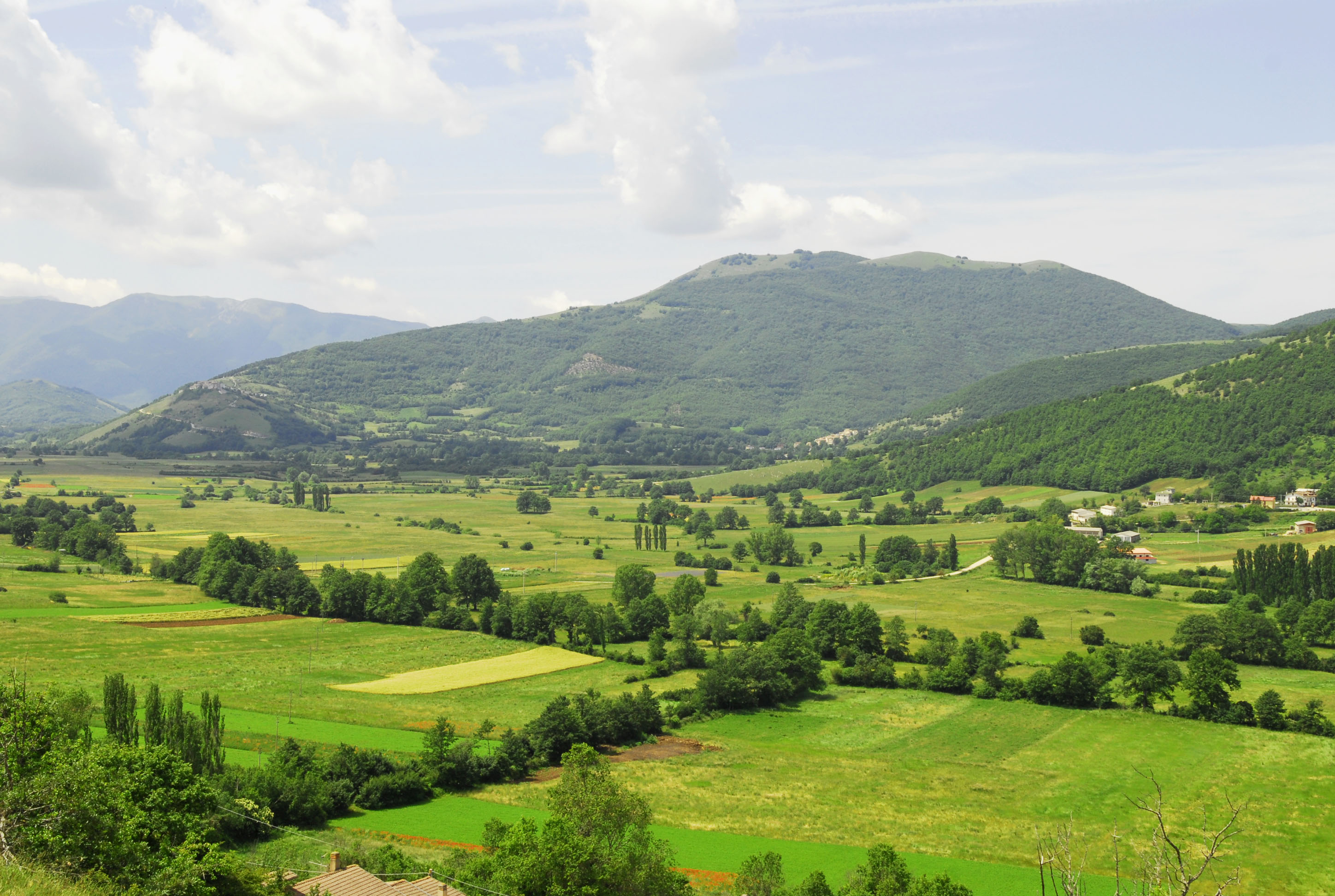 Altipiano di Chiavano, situato tra Umbria e Lazio